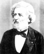 French mathematician Jean-Claude Bouquet (1819-1895)